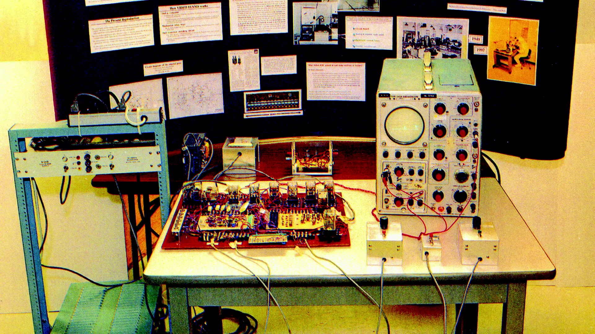 Tennis For Two ricreato nel 1997 in occasione del 50° anniversario della Brookhaven National Laboratory